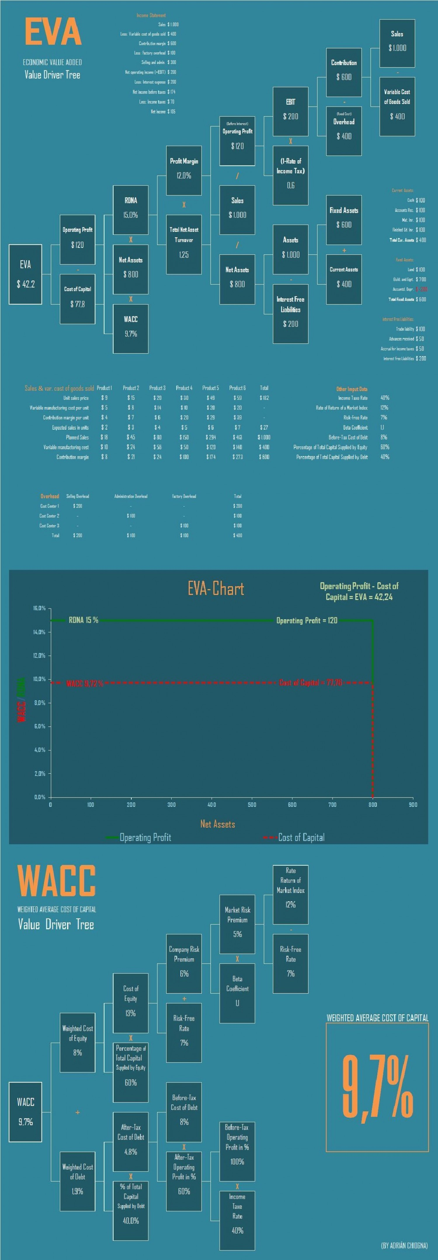 Infografìa: EVA-WACC Tree Model